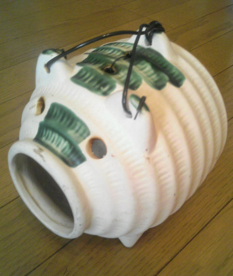 蚊遣豚。製造者不明。投稿者による撮影。2006年9月24日